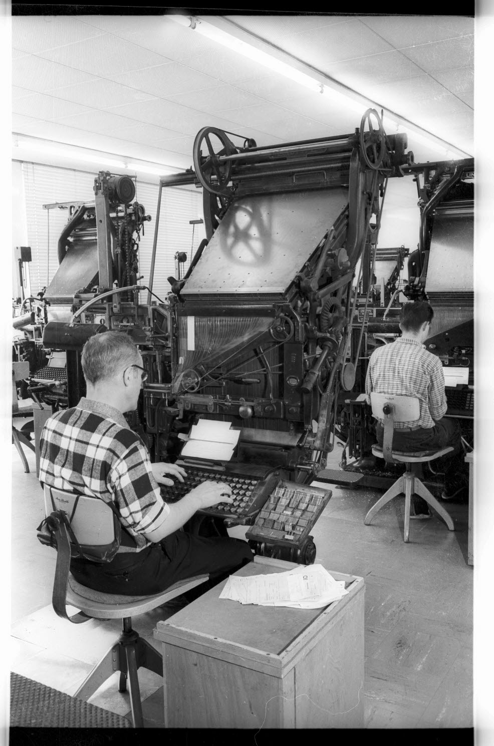 Setzer.